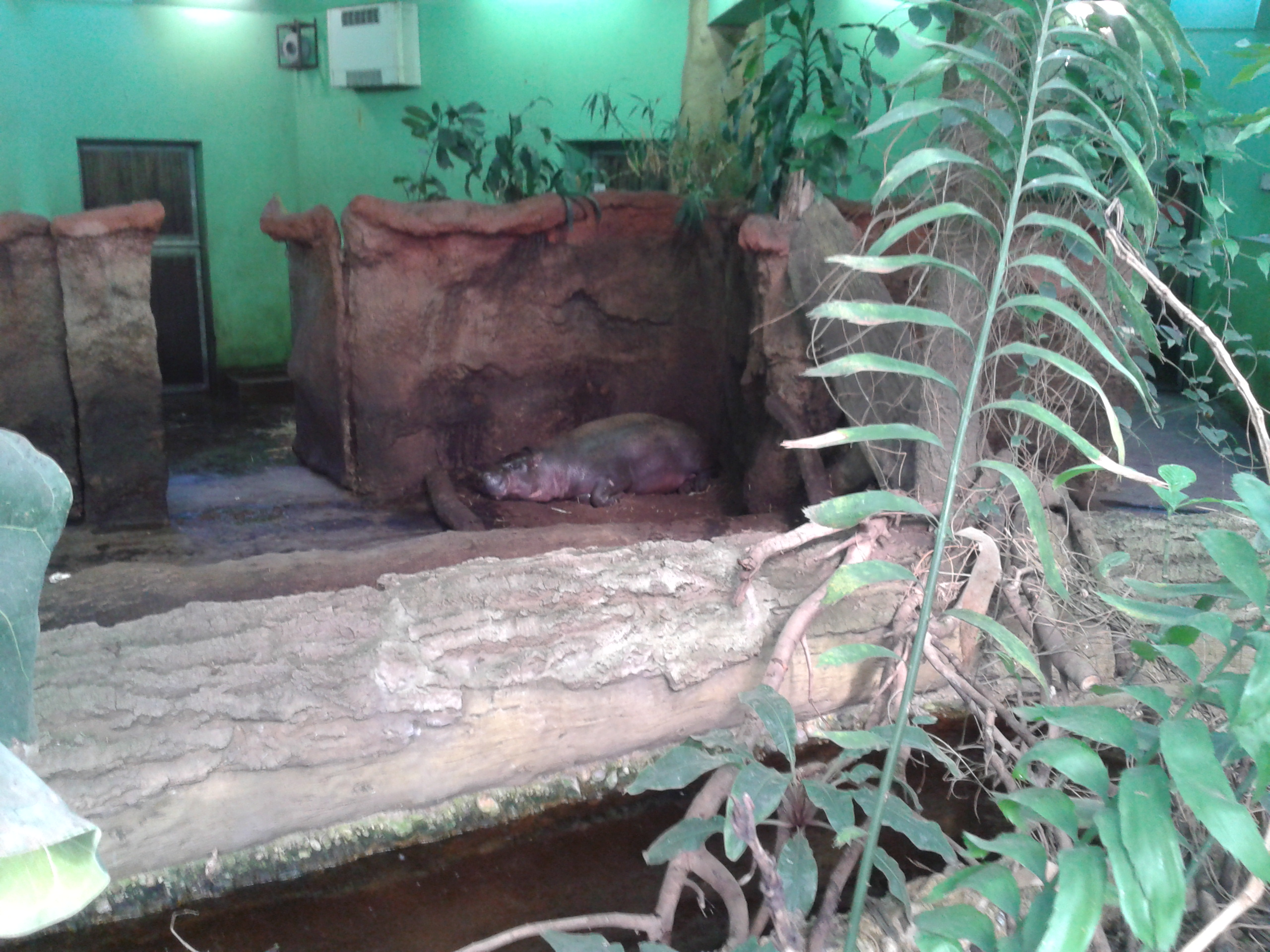 Hrošík librejský v ZOO Plzeň